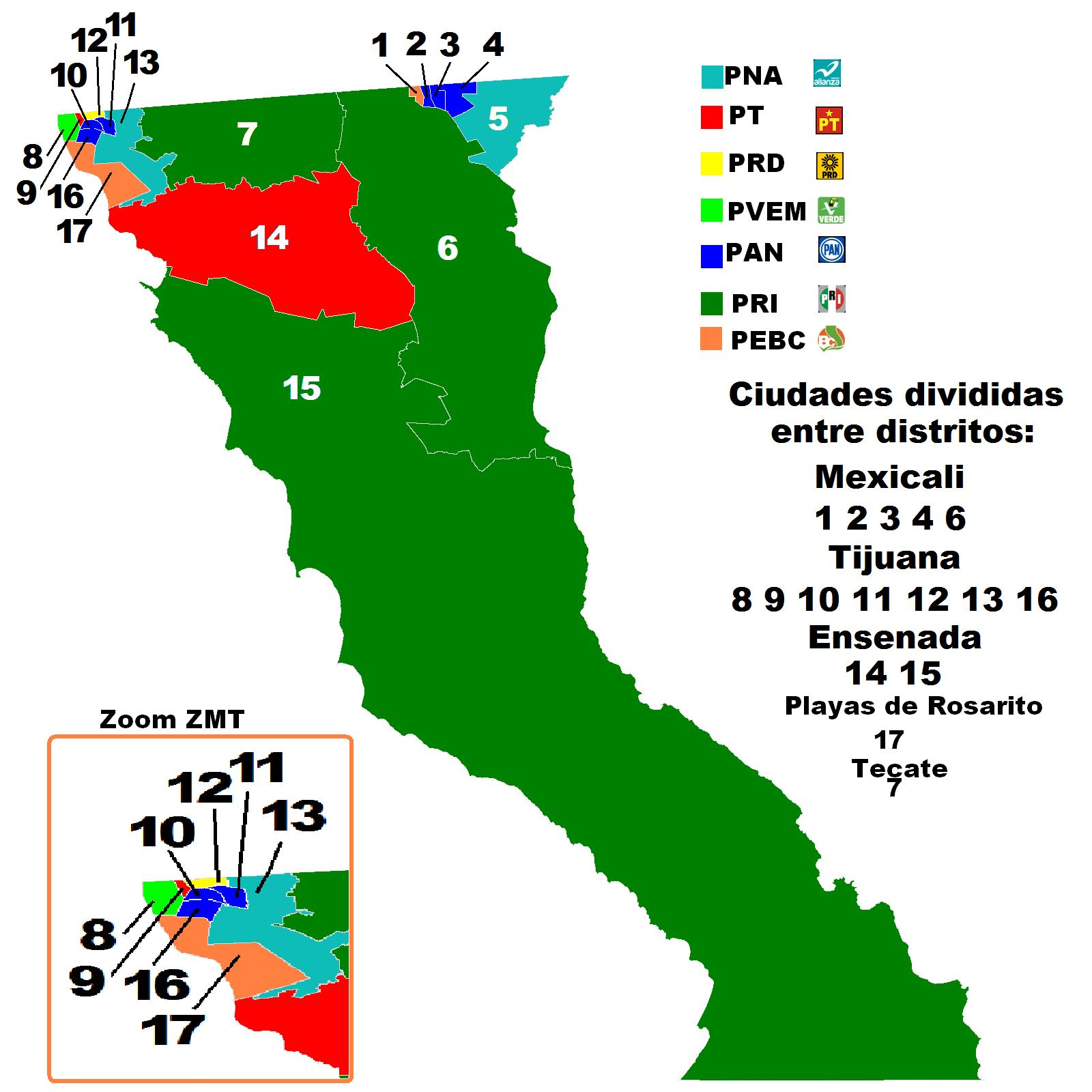 Resultados de las elecciones estatales de BC 2013